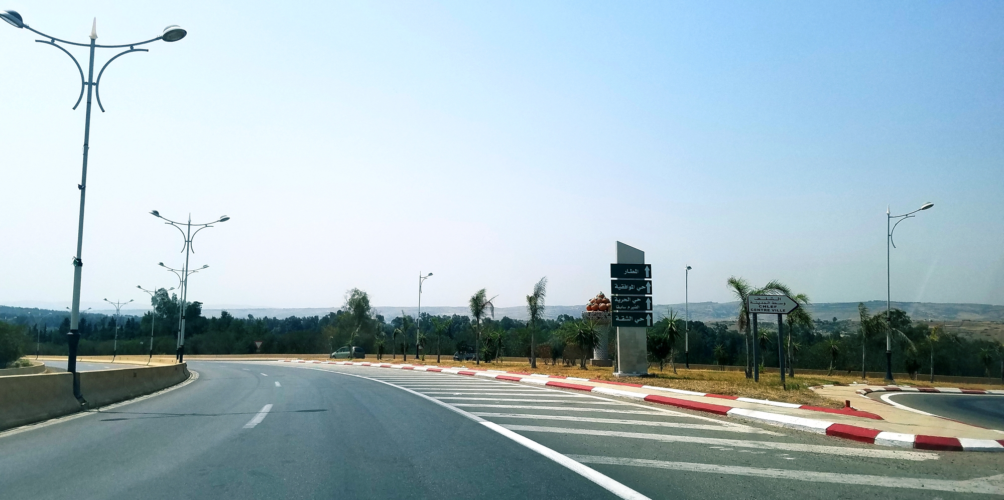 Boulevard périphérique de Chlef, sortie Centre ville